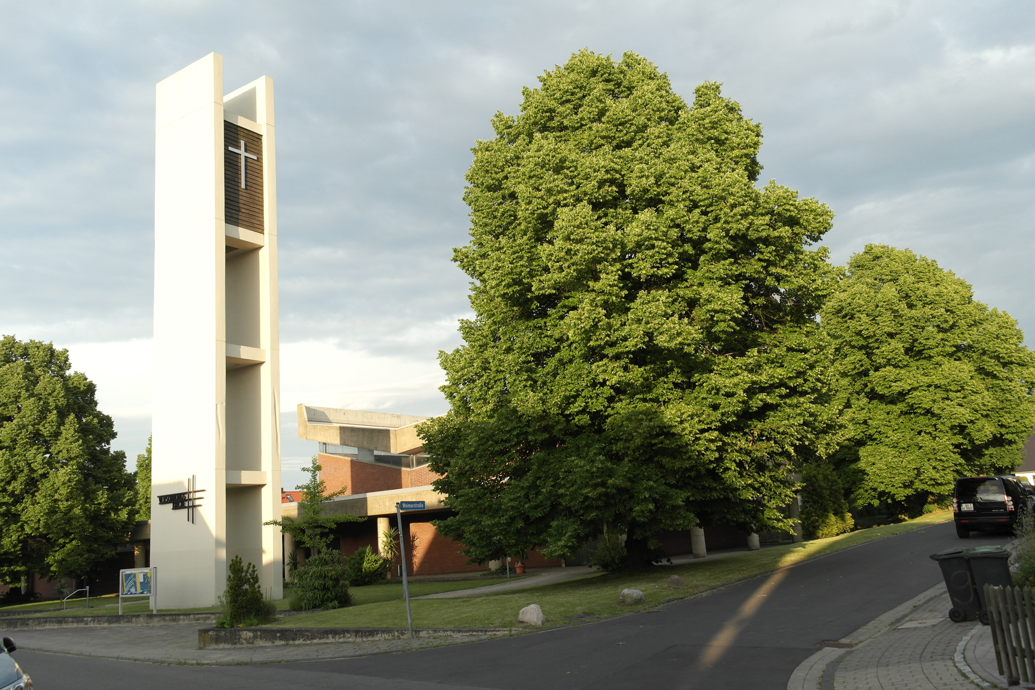 Glockenturm der Versöhnungskirche Wolfenbüttel